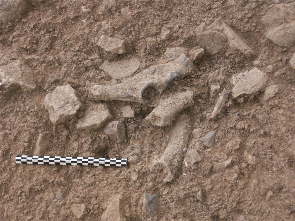 Archaeozoology עצמות בעלי חיים שנמצא בחפירה ארכאולוגית פרהיסטורית אגן של יחמור ושתי קרני צבי מתגלות בחפירה בטרסת מערת אל-ואד, נחל מערות (התרבות הנטופית), כ-14,000 שנה לפני זמננו.